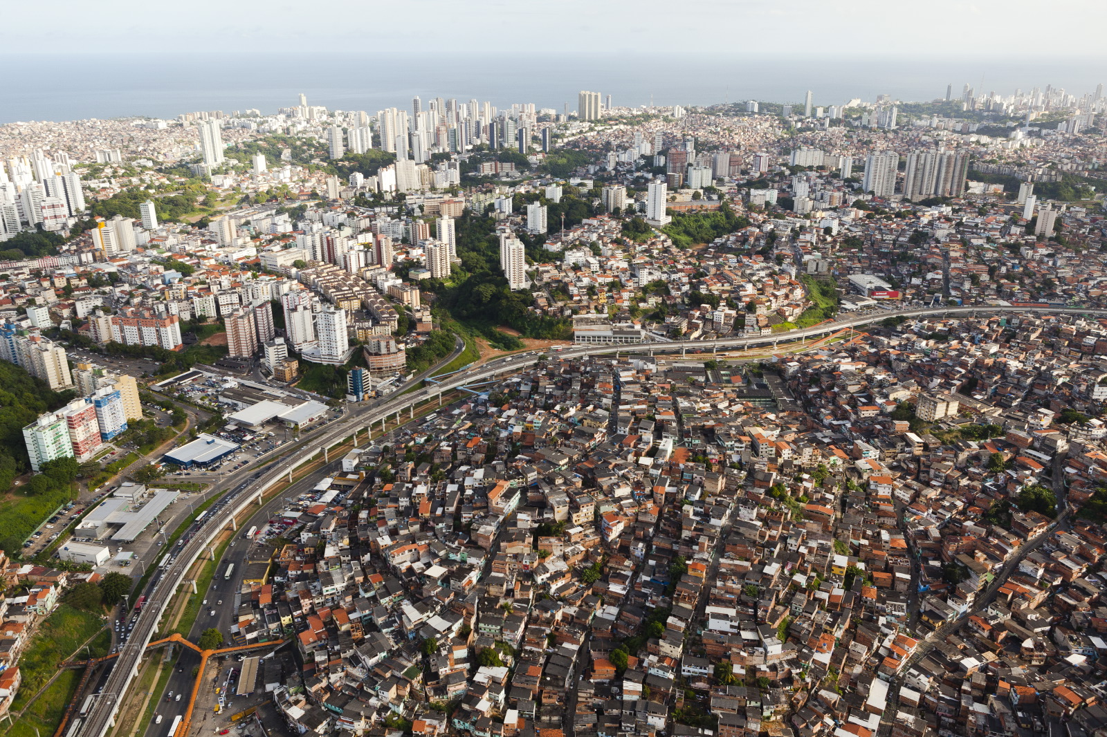 Vista aérea da linha 1 do Metrô de Salvador, próximo à Estação Acesso Norte, em Salvador.